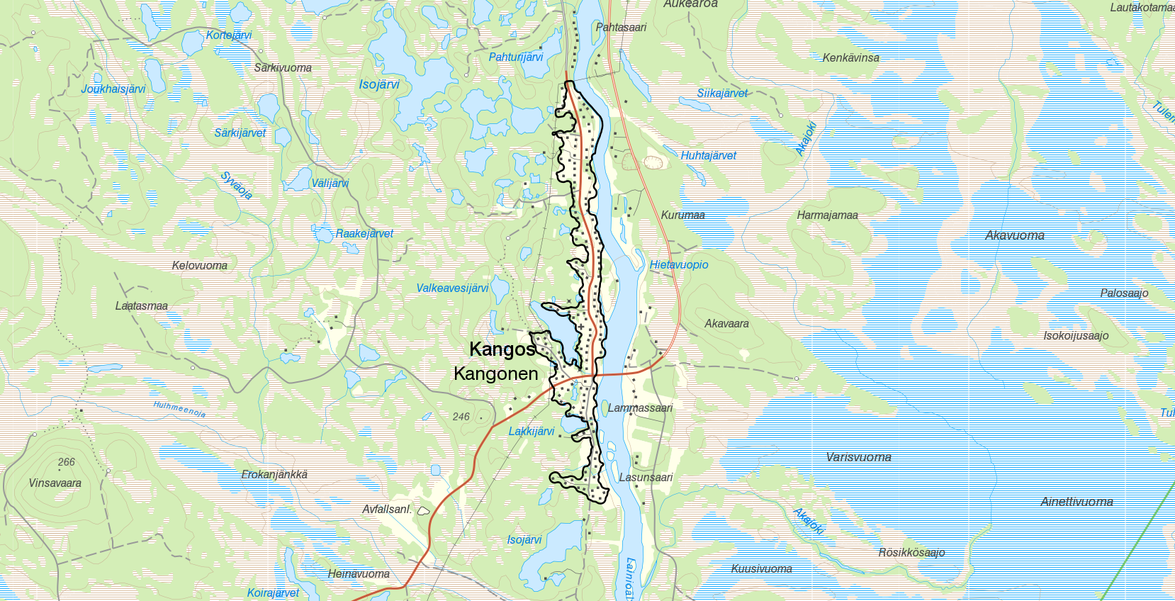 Tätorten Kangos med gränserna från Statistiska centralbyråns tätortsavgränsning 2015. Bakgrundskarta från Lantmäteriet, skala 1:30 236.